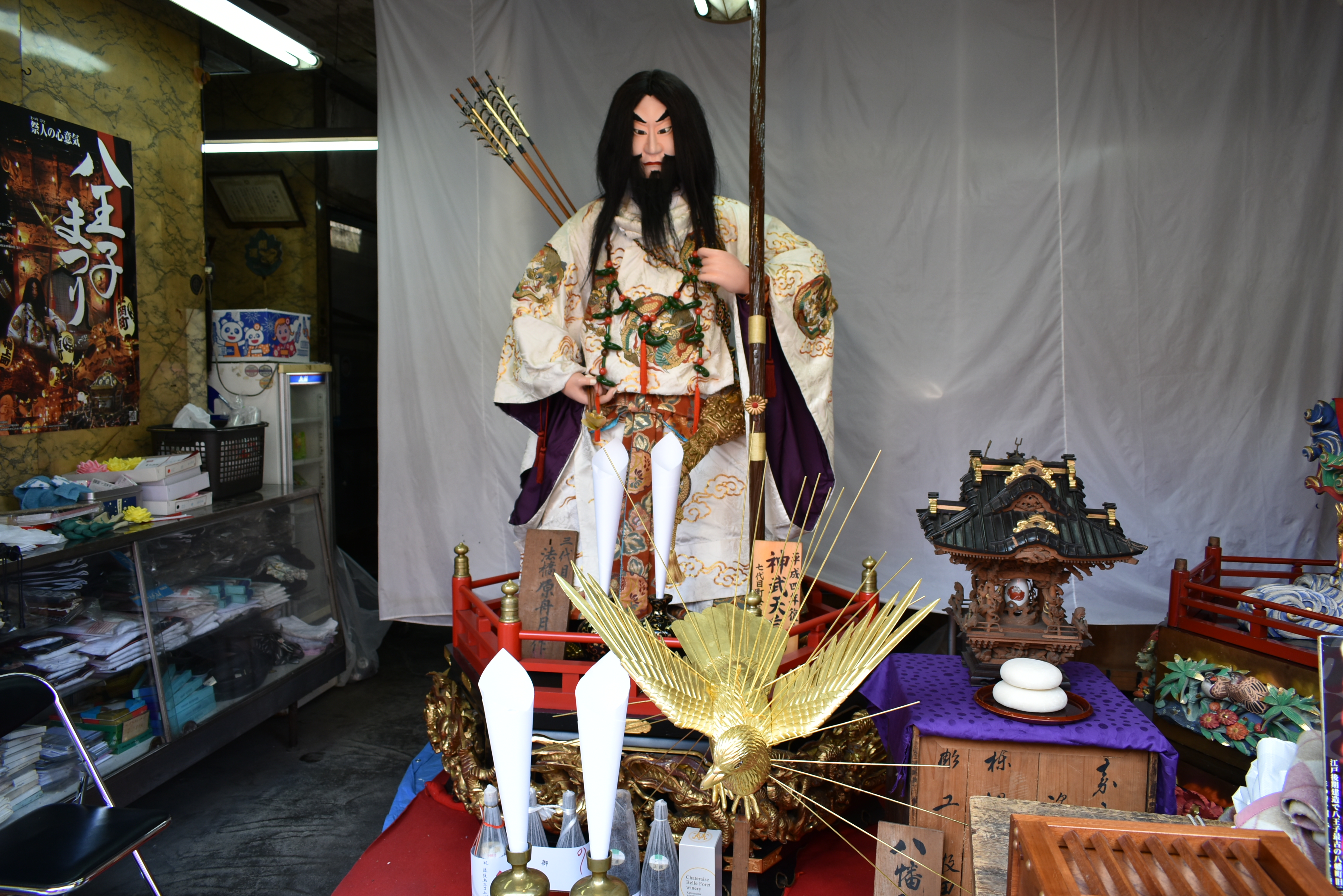 八王子まつり